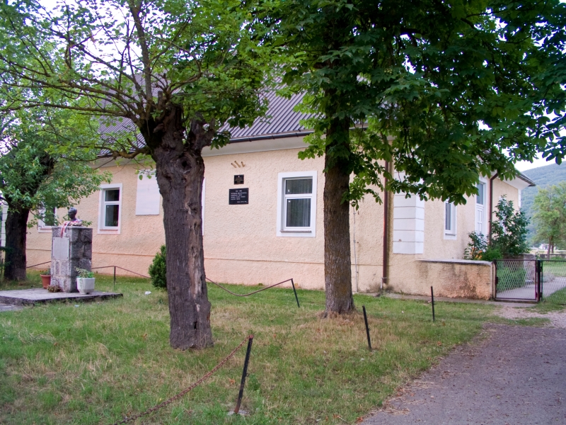 Osnovna škola Zrinskih i Frankopana u Sincu kod Otočca